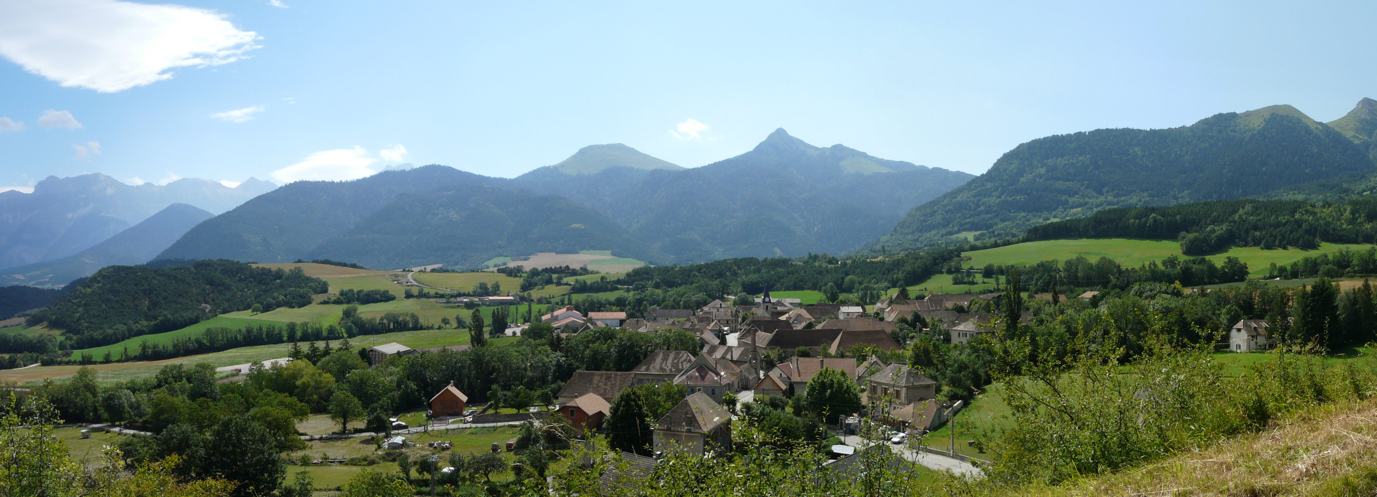 panorama de Saint-Maurice-en-Trièves,Trièves, Isère, France.